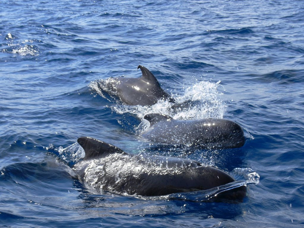 Gewöhnlicher Grindwal (Globicephala melas) in der Straße von Gibraltar vor Tarifa (Spanien)